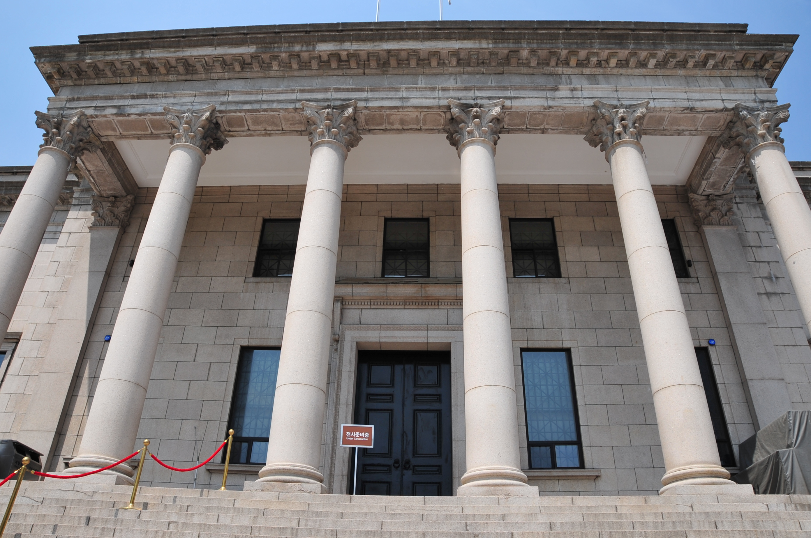 Own work 석조전 서관, 현 덕수궁 미술관